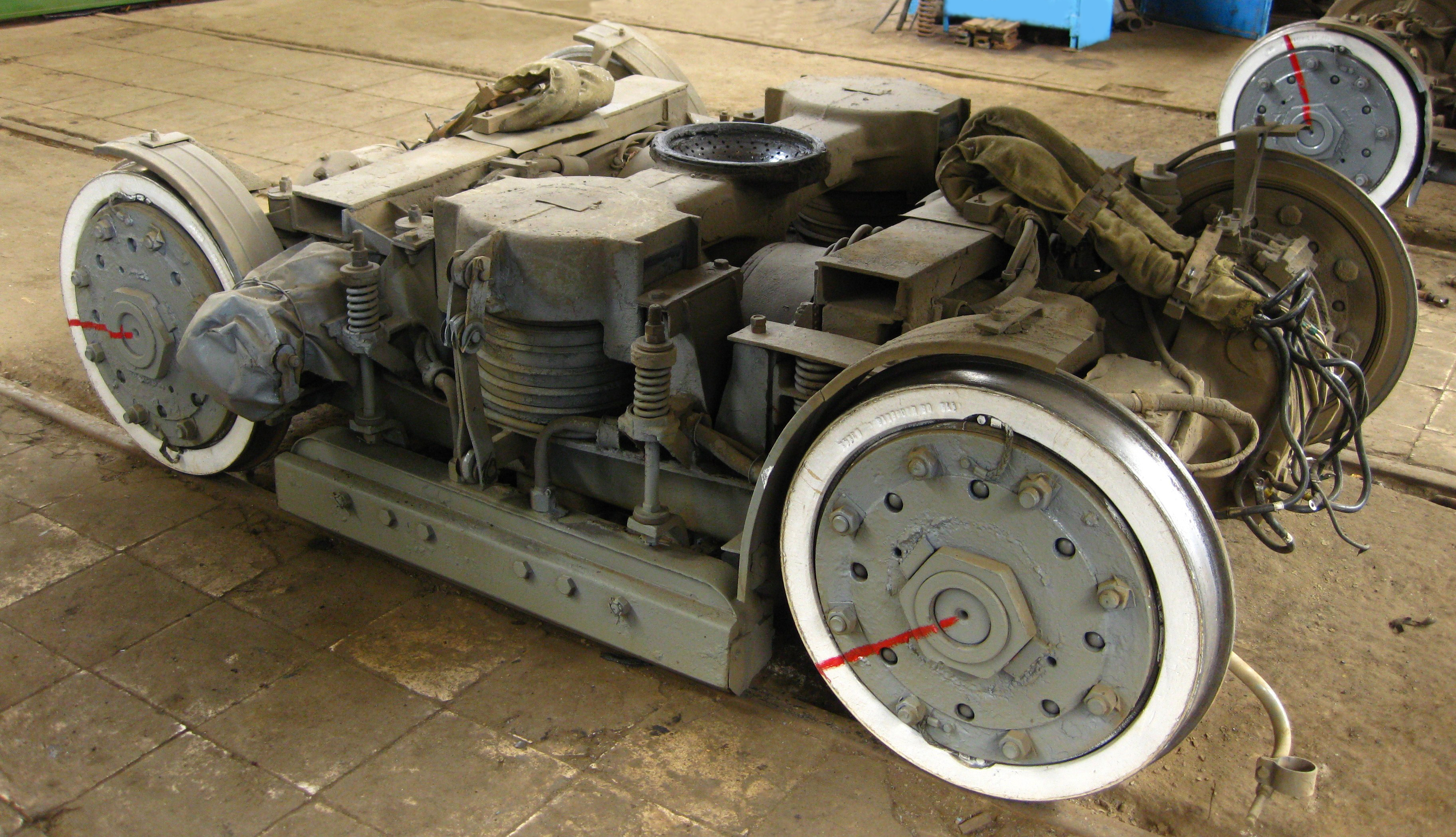 Тележка трамвайного вагона 71-608.